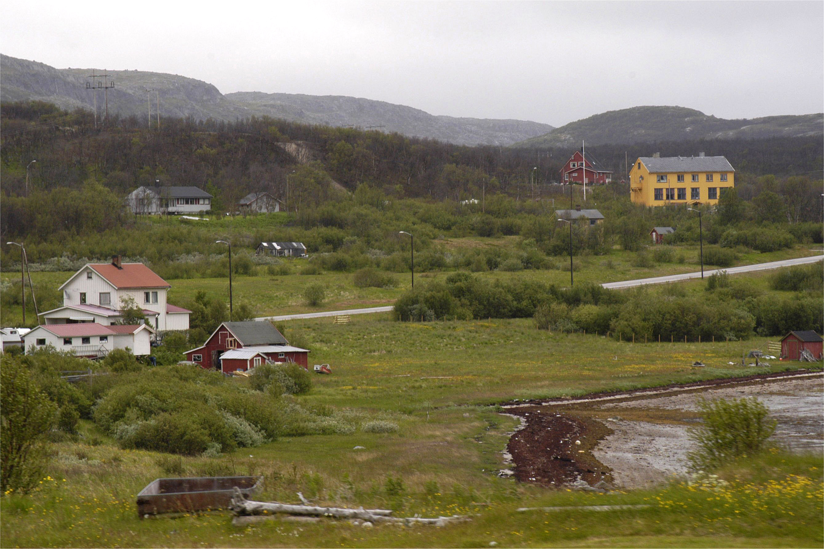 Bugøyfjord in Sør-Varanger, Norway